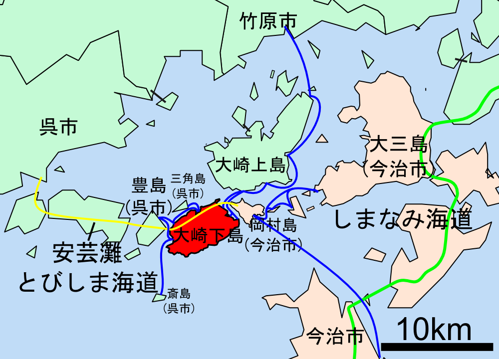 大崎下島の位置図